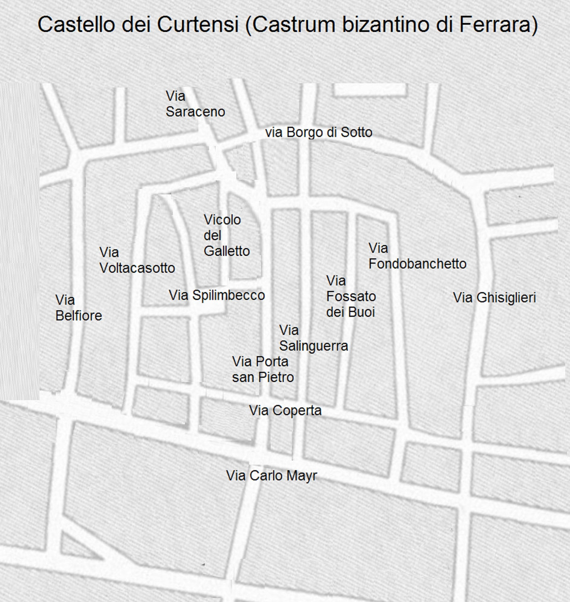 Castrum bizantino di Ferrara. Piantina delle vie attuali che ne facevano parte o vi erano vicine